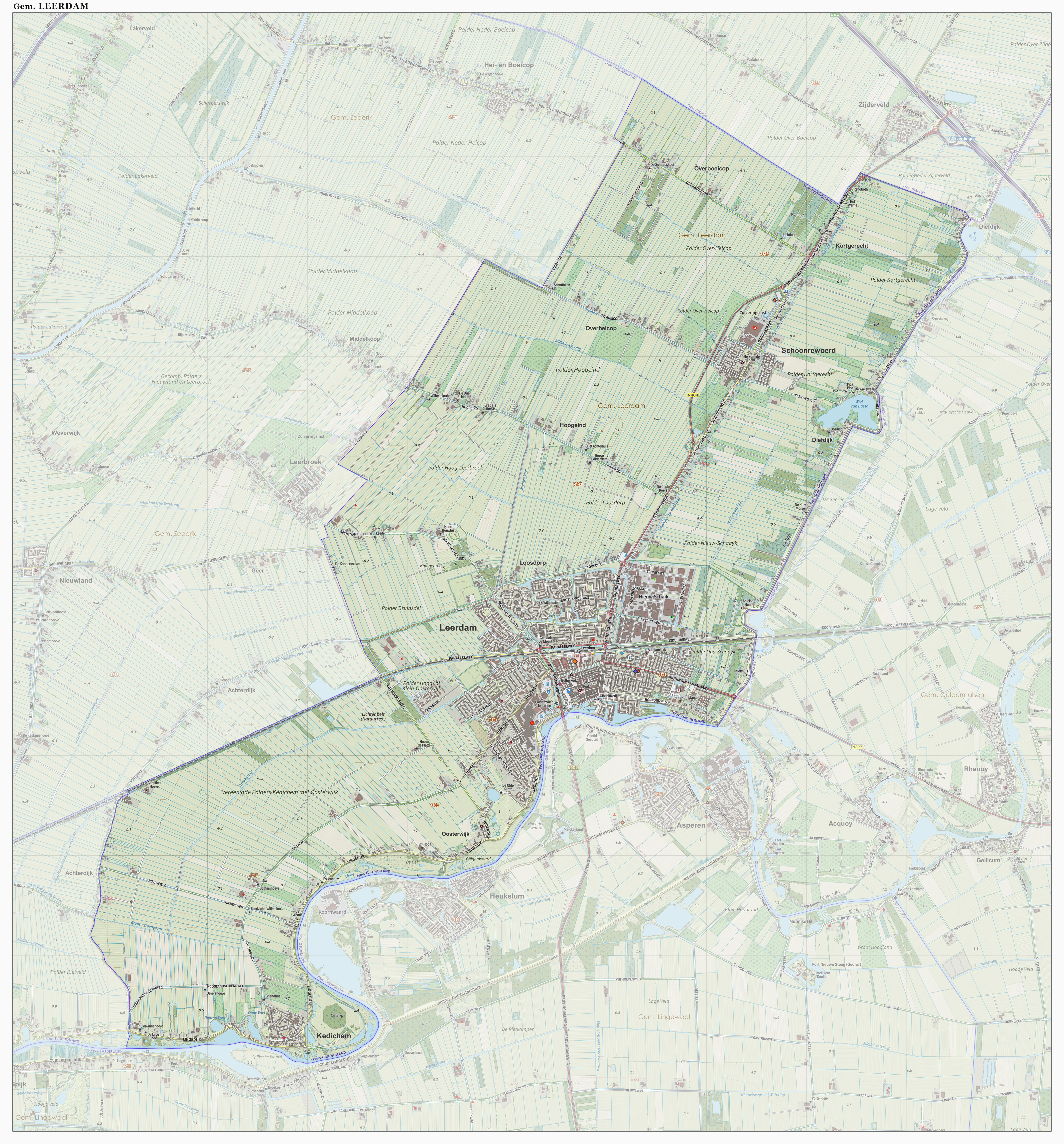 Topografische gemeentekaart. Resolutie: 400 pixels/km. Kaartbeeld samengesteld uit de open geodata van de Top10NL en Top25namen (Kadaster), Creative Commons-BY licentie. Gebouwvlakken uit open geodata BAG extract. Wegen uit de OpenStreetMap, OpenStreetMap community. Reliëfschaduw uit de Actuele Hoogtekaart AHN2. Samenstelling en kleurenschema: Jan-Willem van Aalst, met QGIS. Zie ook de Legenda.